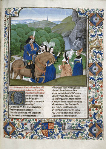 enluminure du Chemin de Vaillance